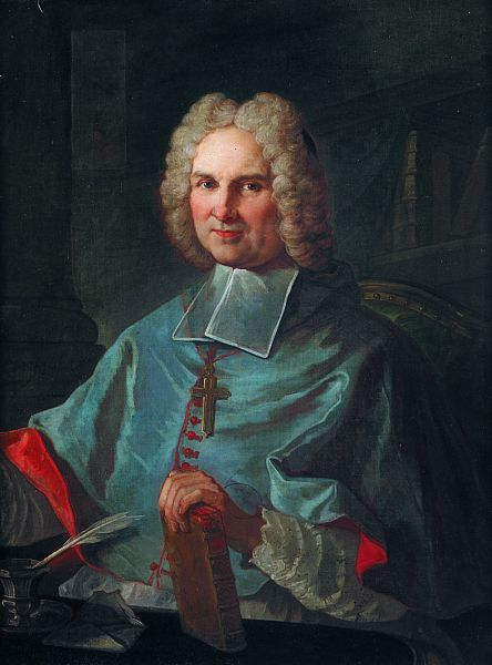 Portrait de Monseignor Rosseau de la Parisière, Évêque de Nîmes en 1711